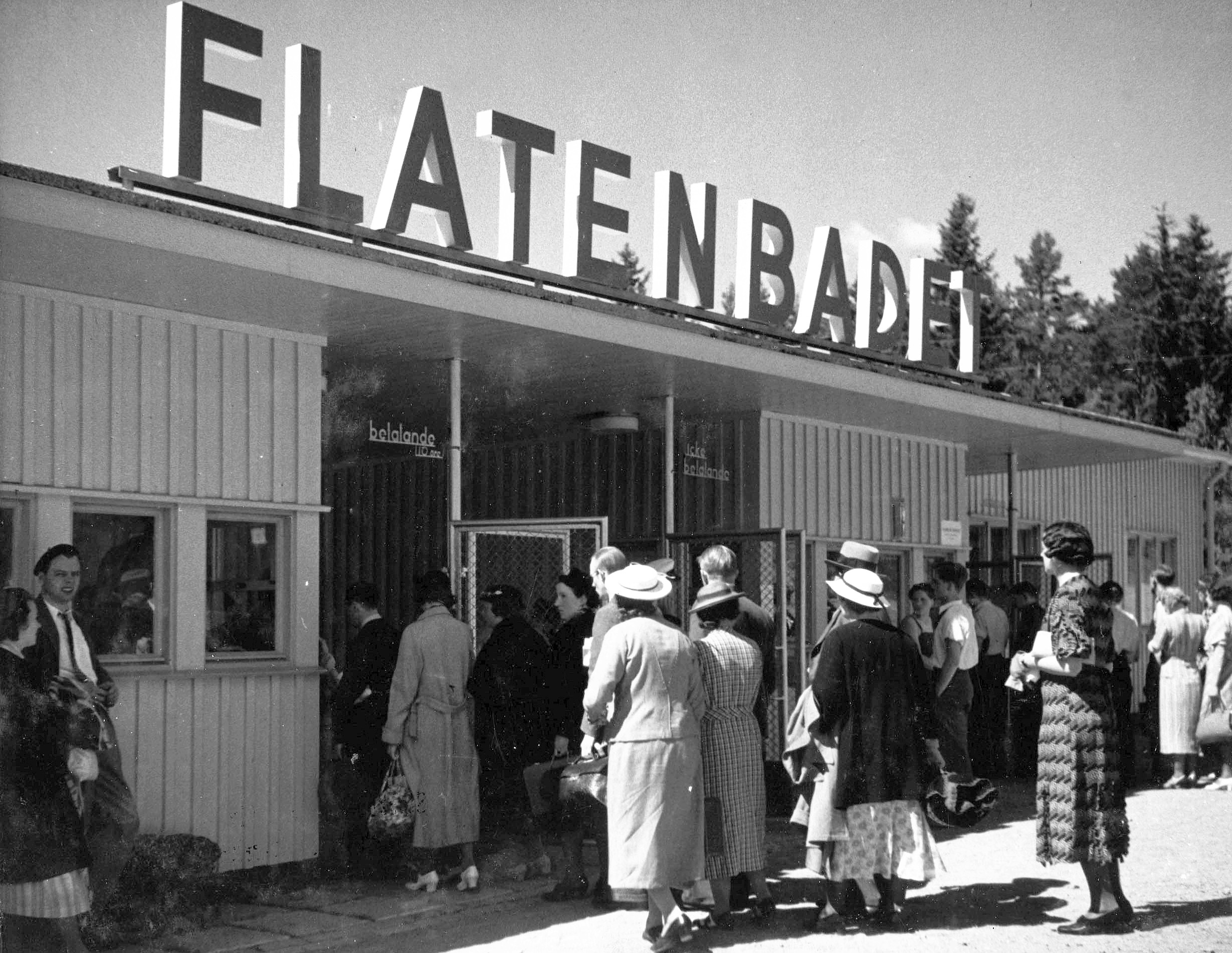 Flatenbadet: Entrén till badet under sommaren 1937